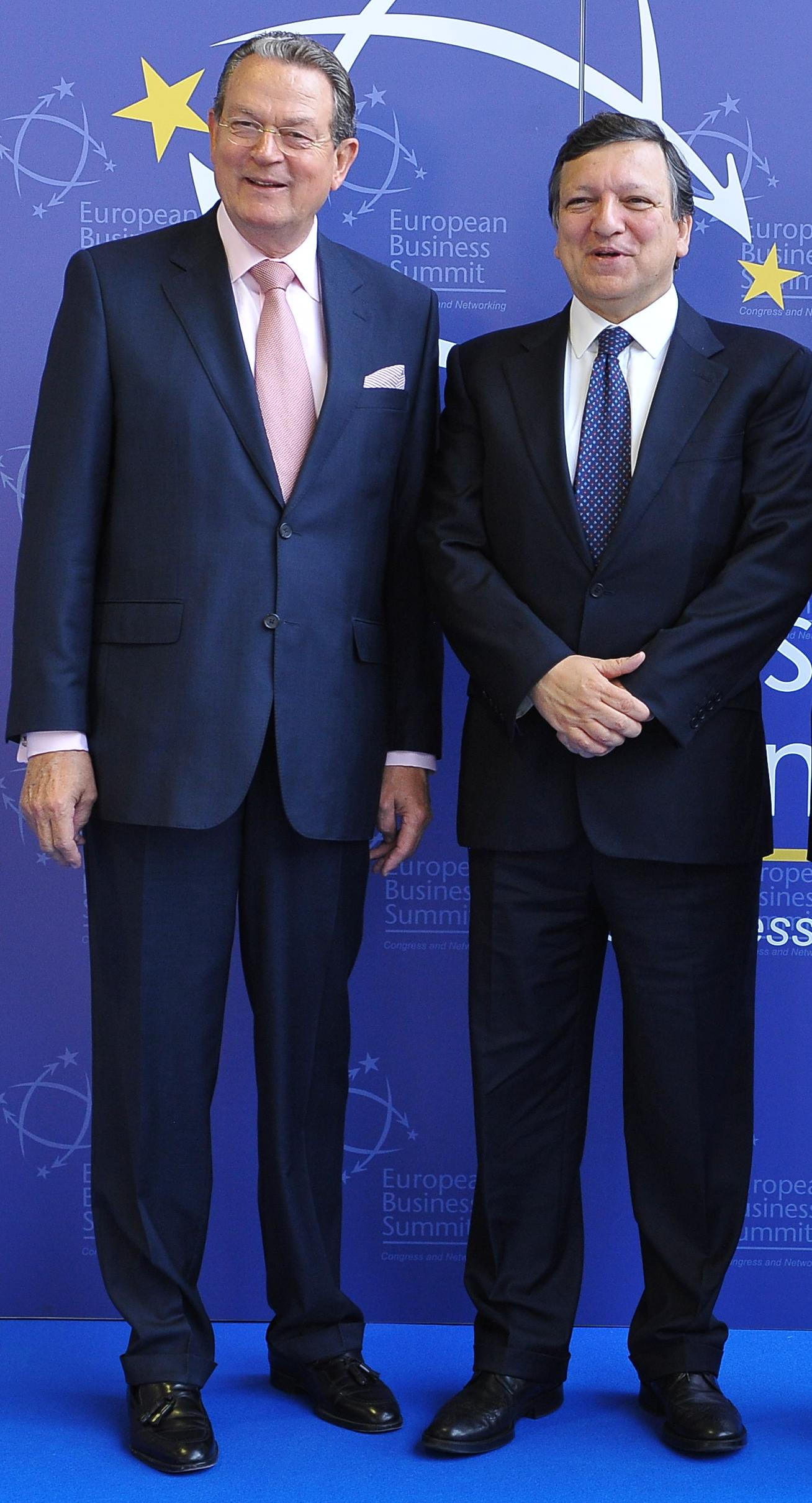 BUSINESSEUROPE Präsident Jürgen R. Thumann und EU-Kommissionpräsident José Manuel Durão Barroso auf dem European Business Summit 2012 in Brüssel